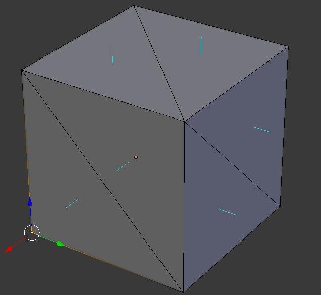 STL cube with normals, from Blender screen